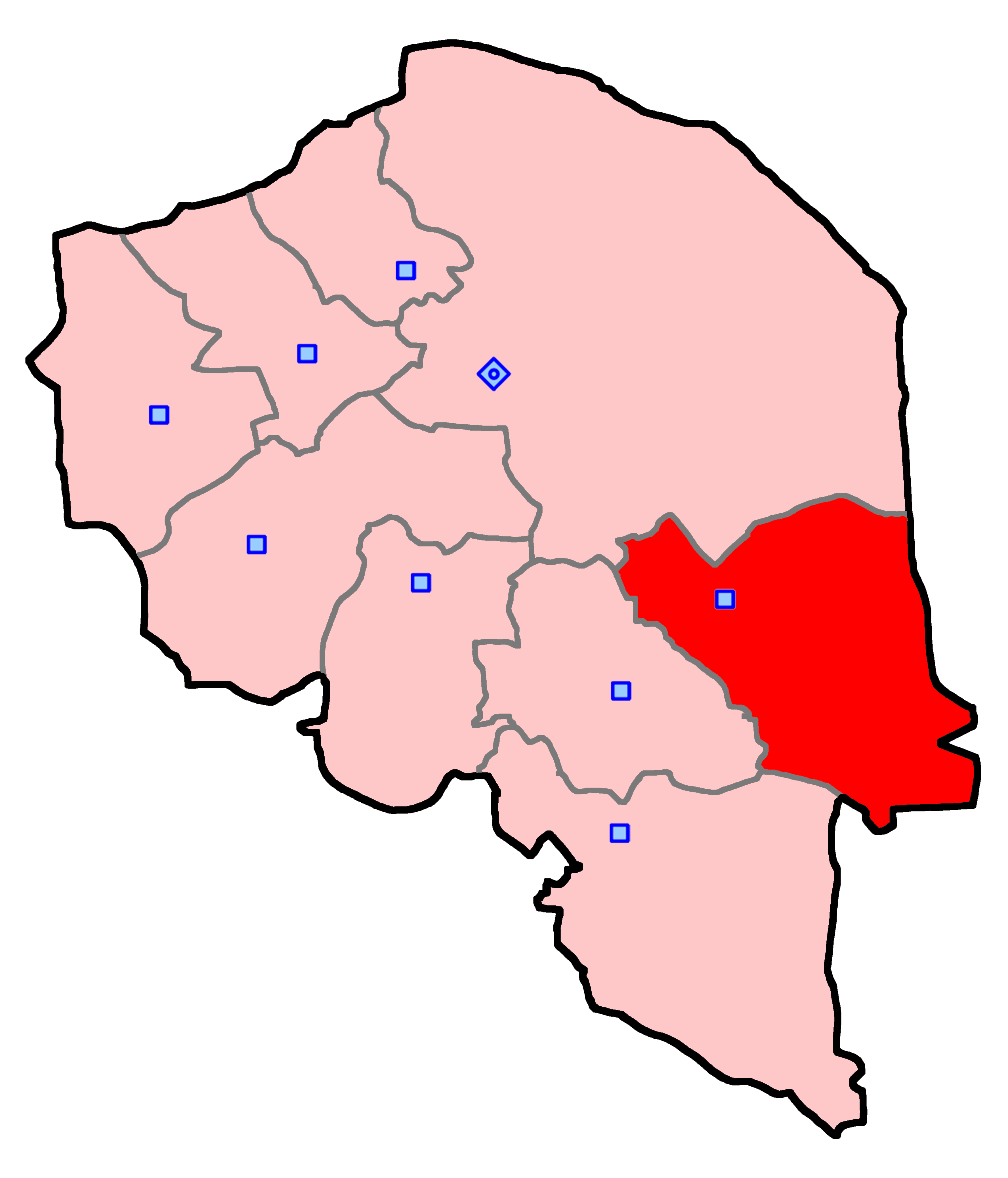 بم، ریگان، فهرج و نرماشیر برای انتخابات مجلس شورای اسلامی